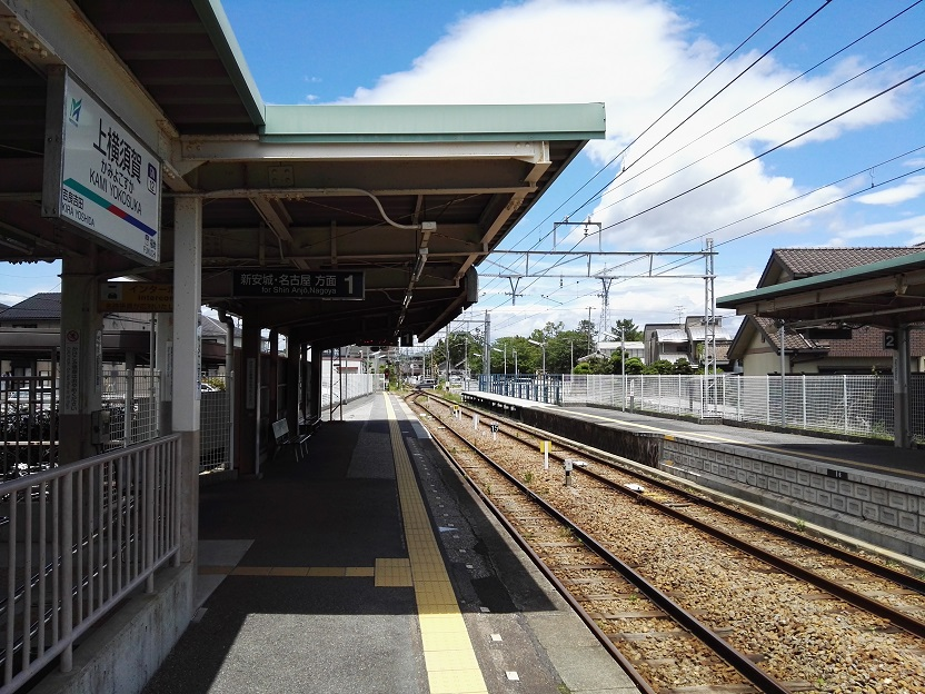 Kami Yokosuka station platform